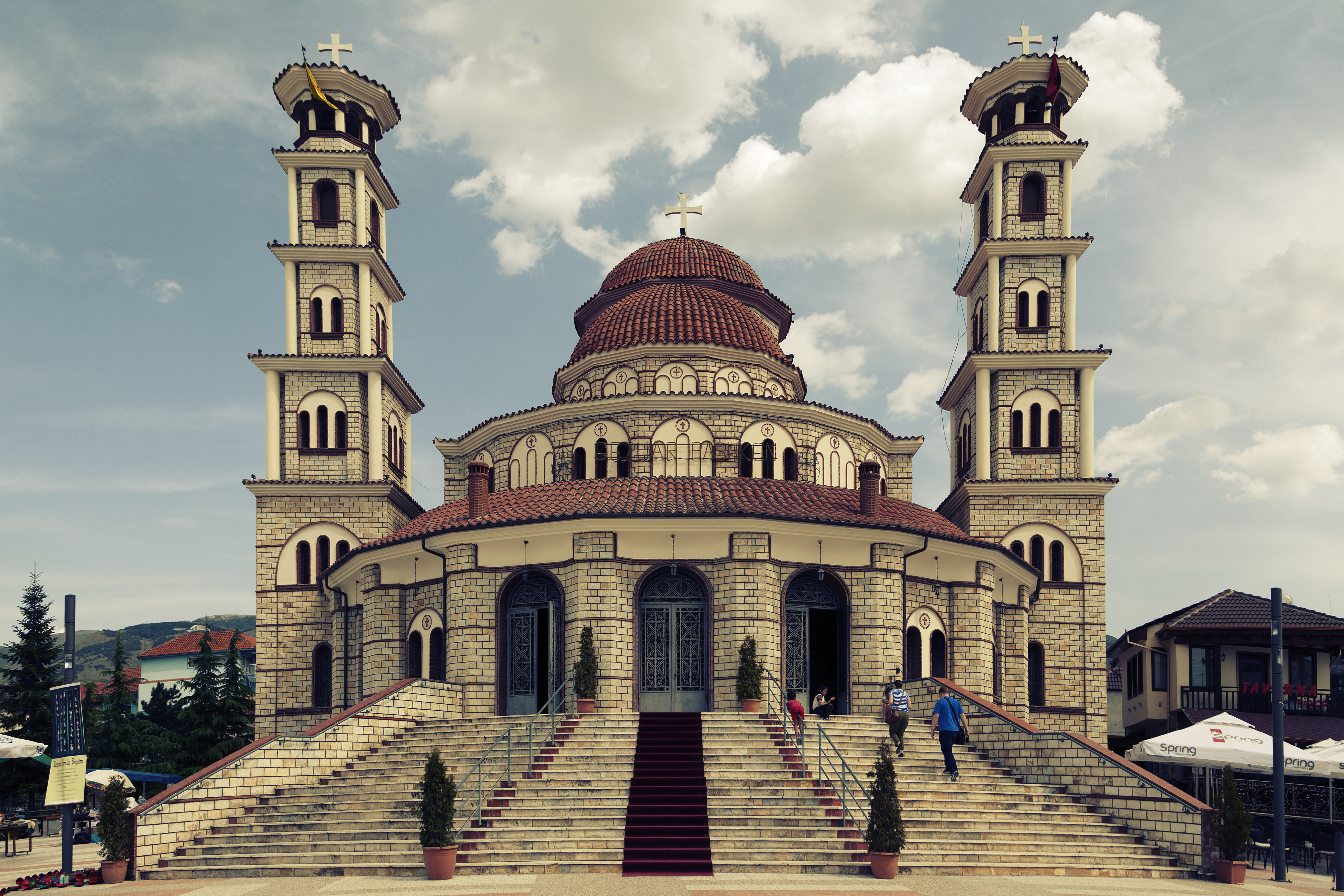 Korçë, Albania